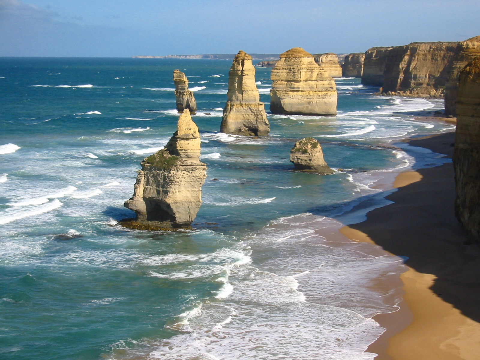 Apostel Panorama